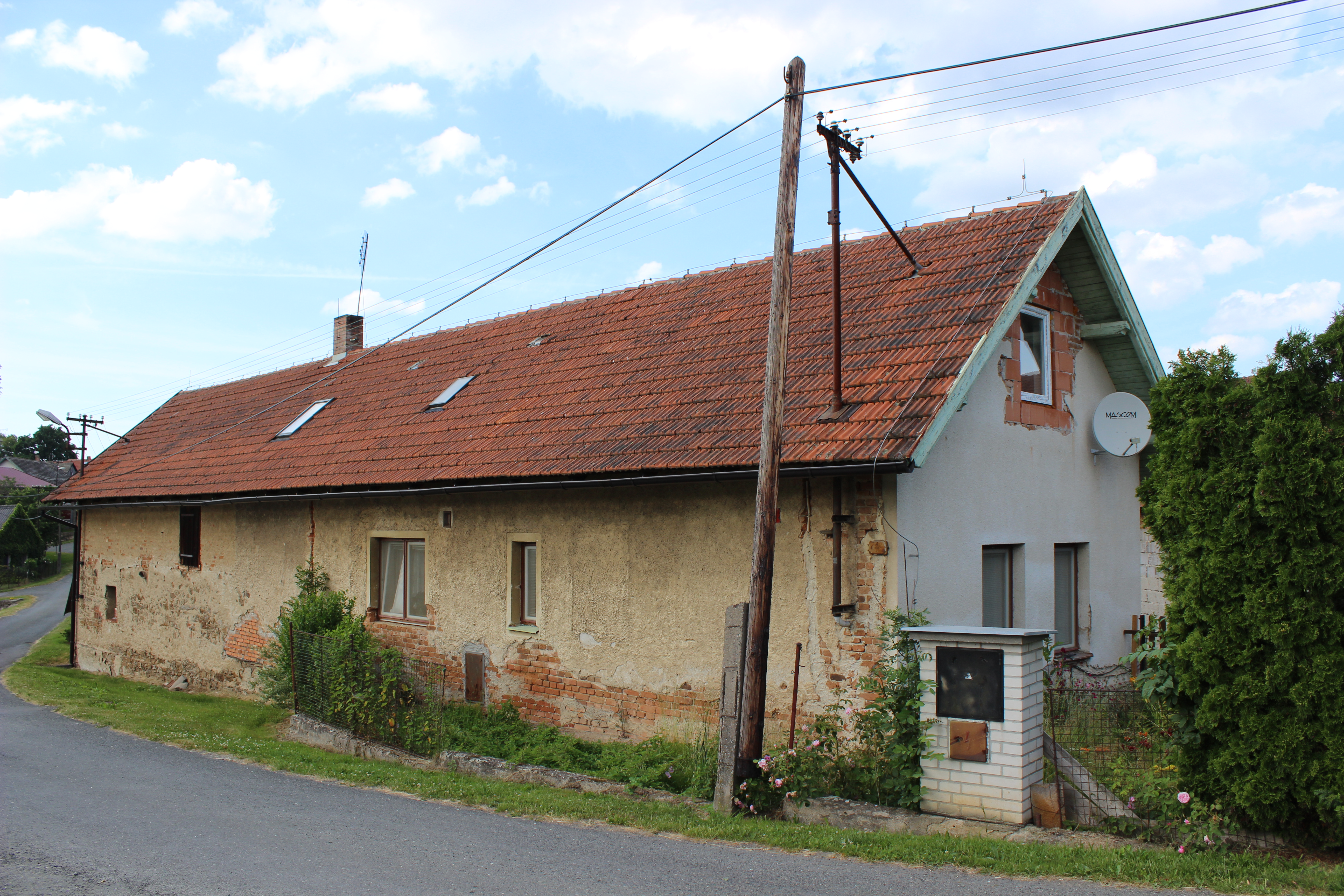 Dům číslo popisné 7 v Němčicích, součásti Lokte v benešovském okrese.